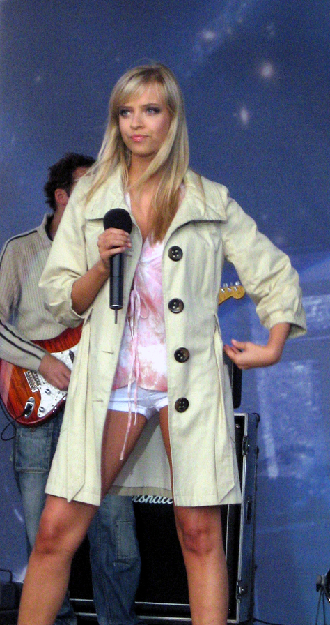 The Jet Set na dniu Otwartym TVP (9 września 2007)